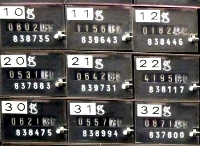 Gebührenzähler Österreich